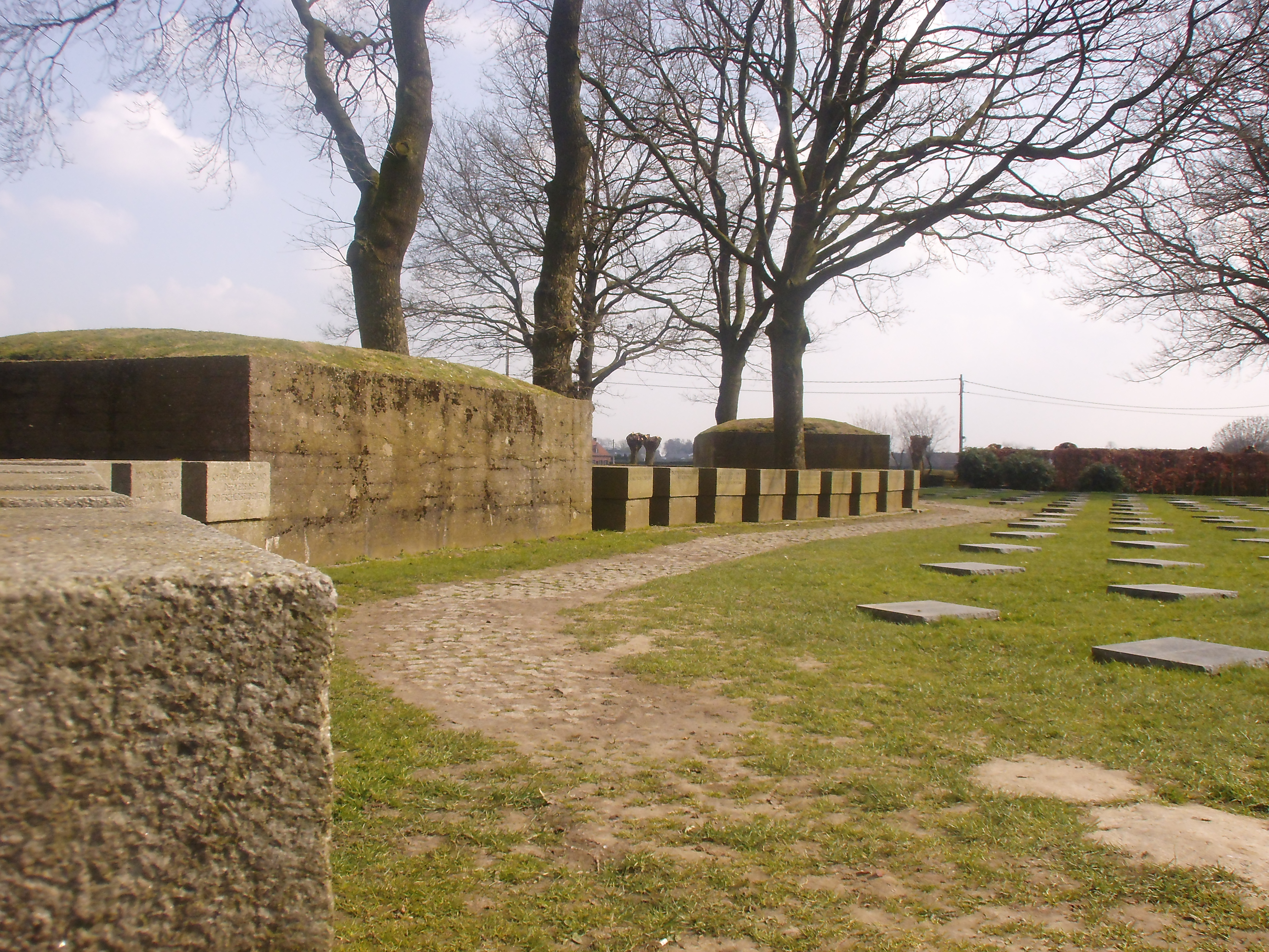 Deutscher Soldatenfriedhof Langemark, ehem. Betonunterstand und Stelenreihe der studentischen Korporationsverbände